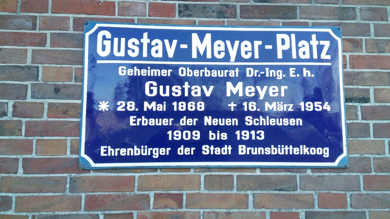 Brunsbüttel/Gedenktafel am Gustav-Meyer-Platz